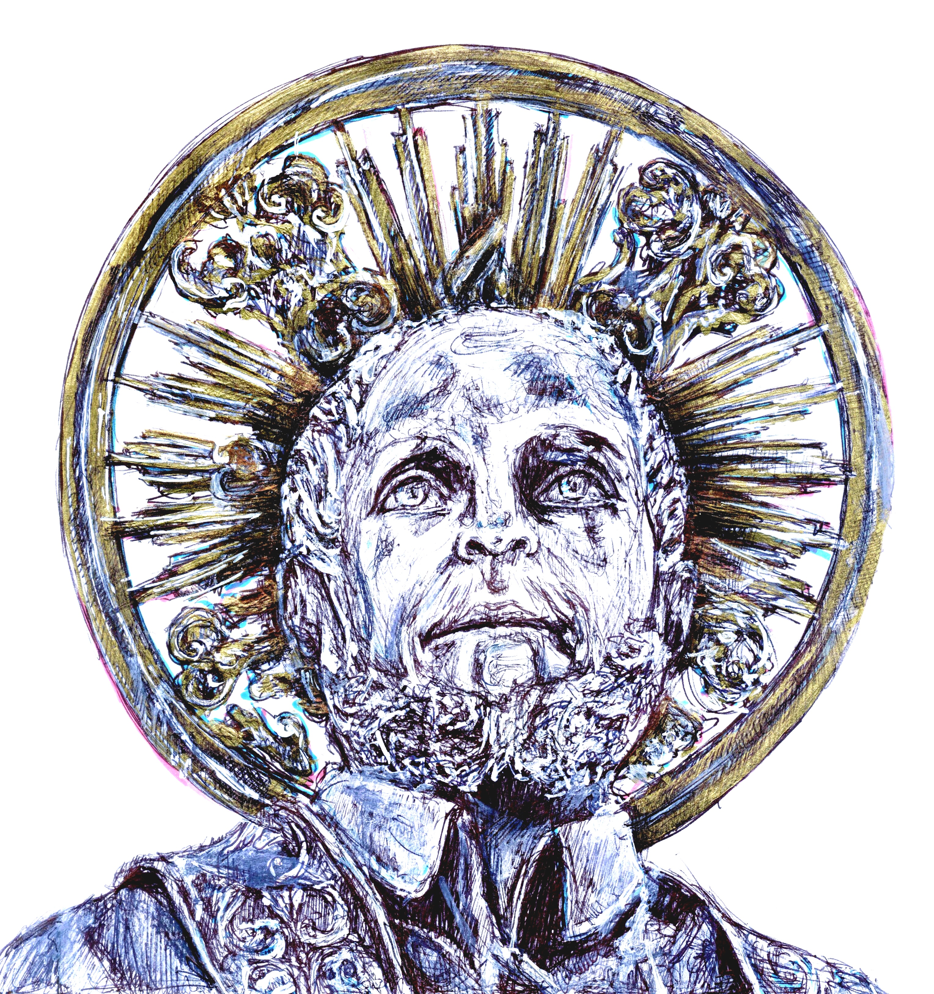 litografia di Sant'Antimo Prete e Martire